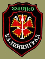 эмблема